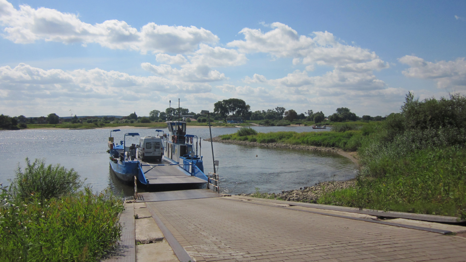 Ferry Bleckede - Neu Bleckede over the Elbe river. Niedersachsen , Germany.